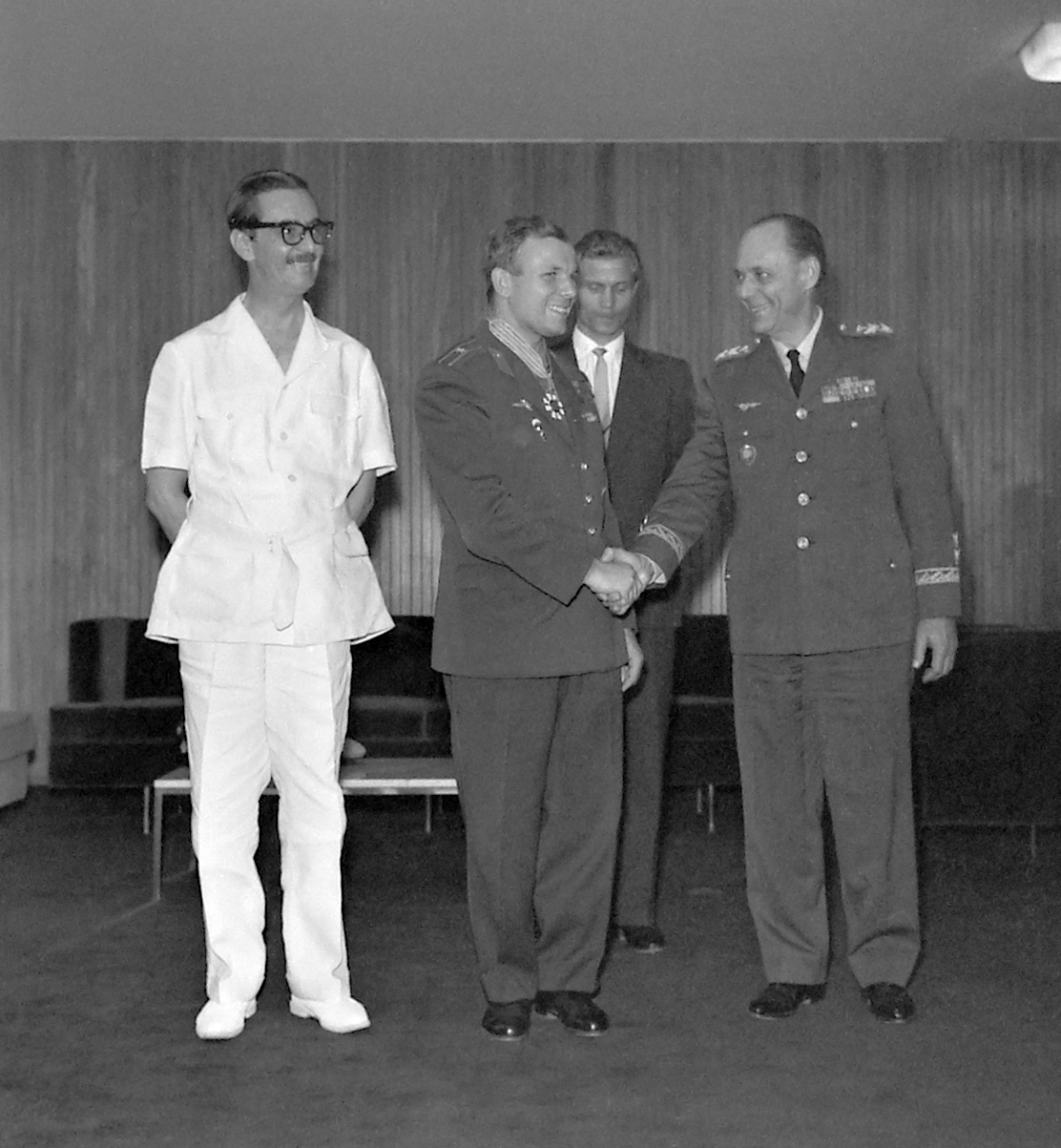 Fundo Agência Nacional.